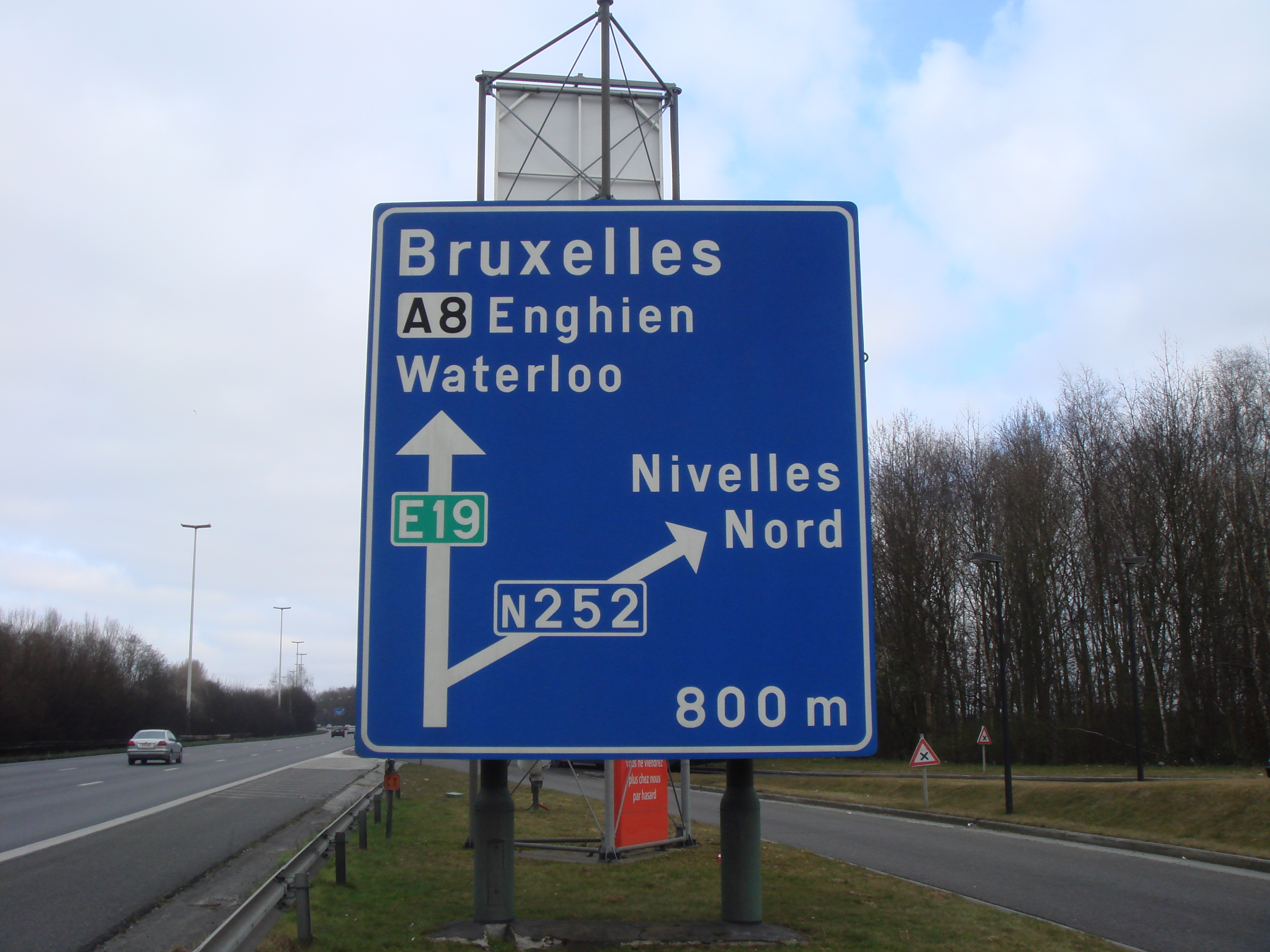 Autoroute E19 au niveau de Nivelles en Belgique